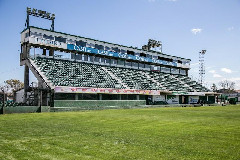 Sportivo